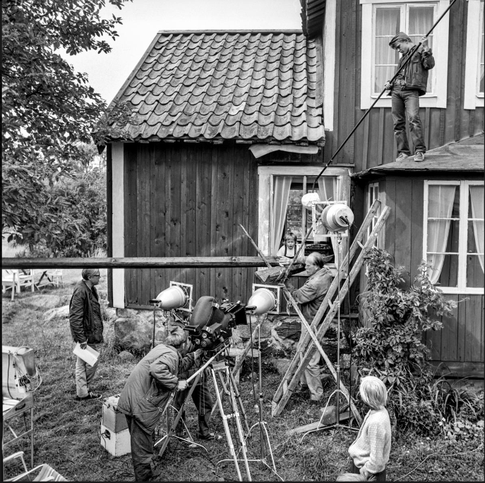 Inspelning på Norröra av tv-serien Vi på Saltkråkan 1963.